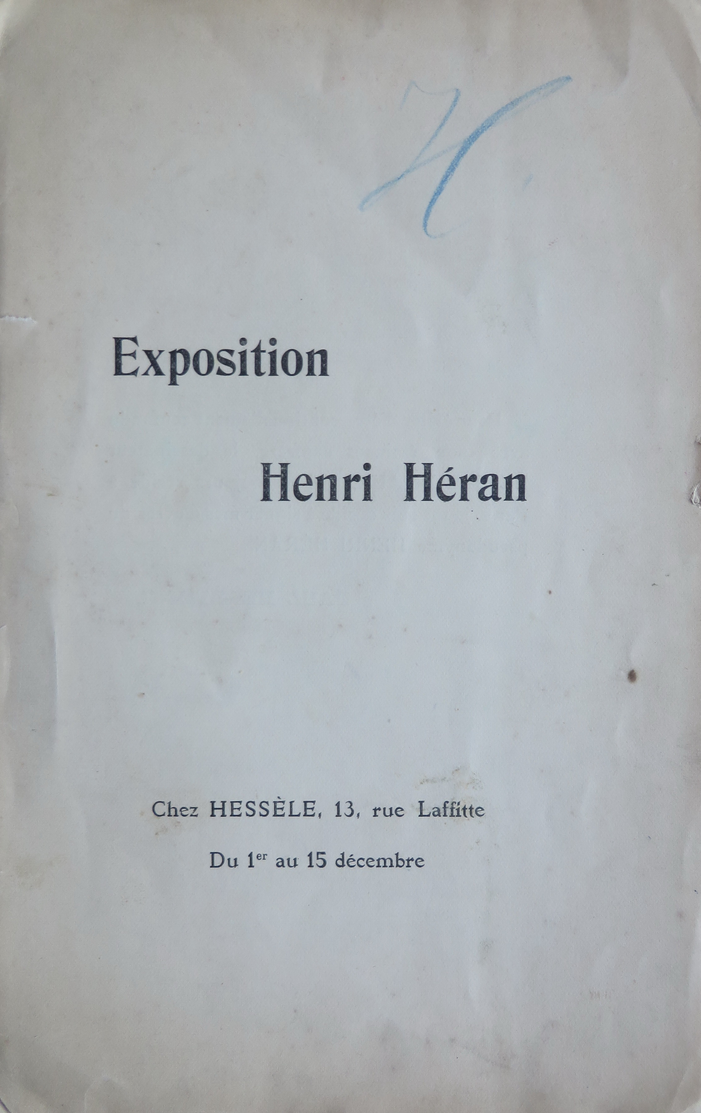 Erste Einzelausstellung von Paul Herrmann (Henri Héran) 1900